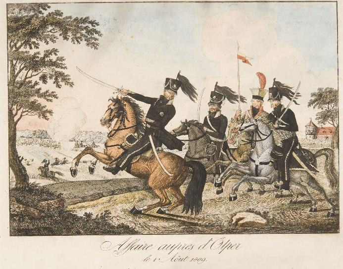 Affaire aupres d'Ölper 1809, zeitgenössischer Kupferstich